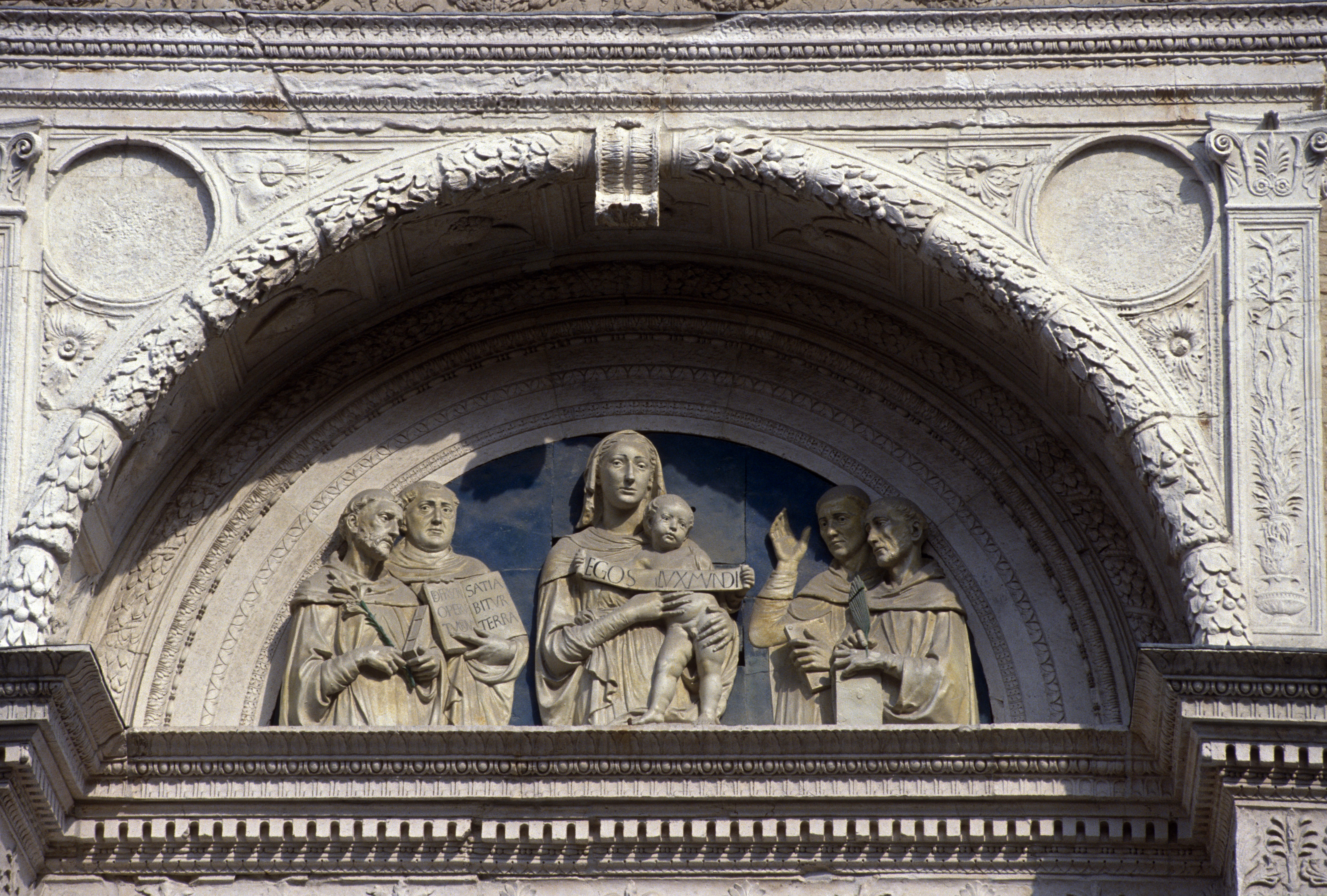 Urbino, Marche, Italia